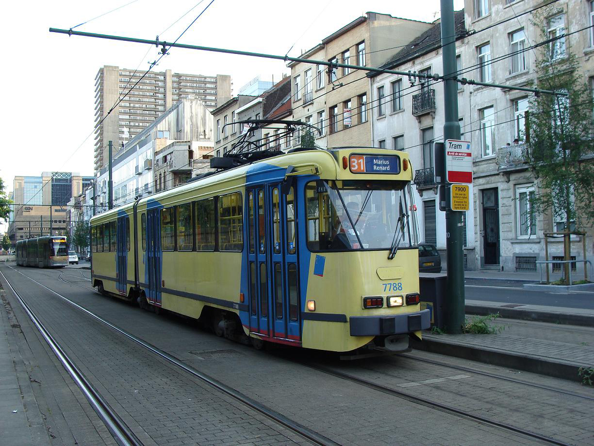 La motrice 7788 sur la ligne de tram 31 à l'arrêt Marius Renard, à Bruxelles.